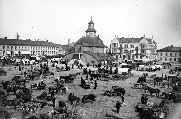 Nya stadens torg, Lidköping på 1920-talet.